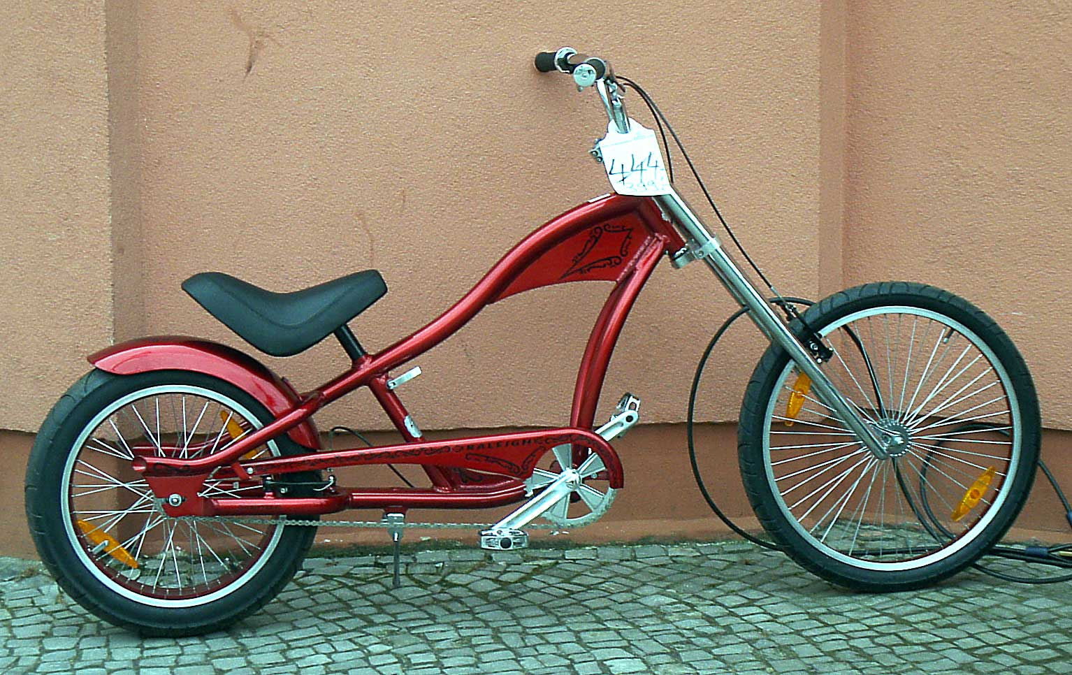 Cruiser-Fahrrad